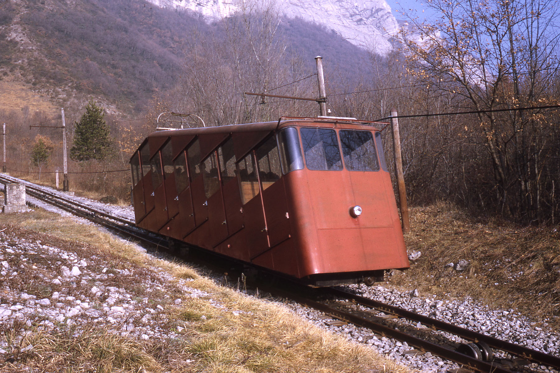 Funiculaire de Saint-Hilaire-du-Touvet avant sa rénovation